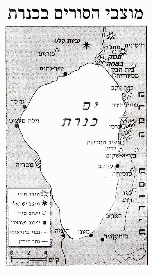 מיקום המוצבים הסורים לאורך החוף הצפון מזרחי של הכנרת